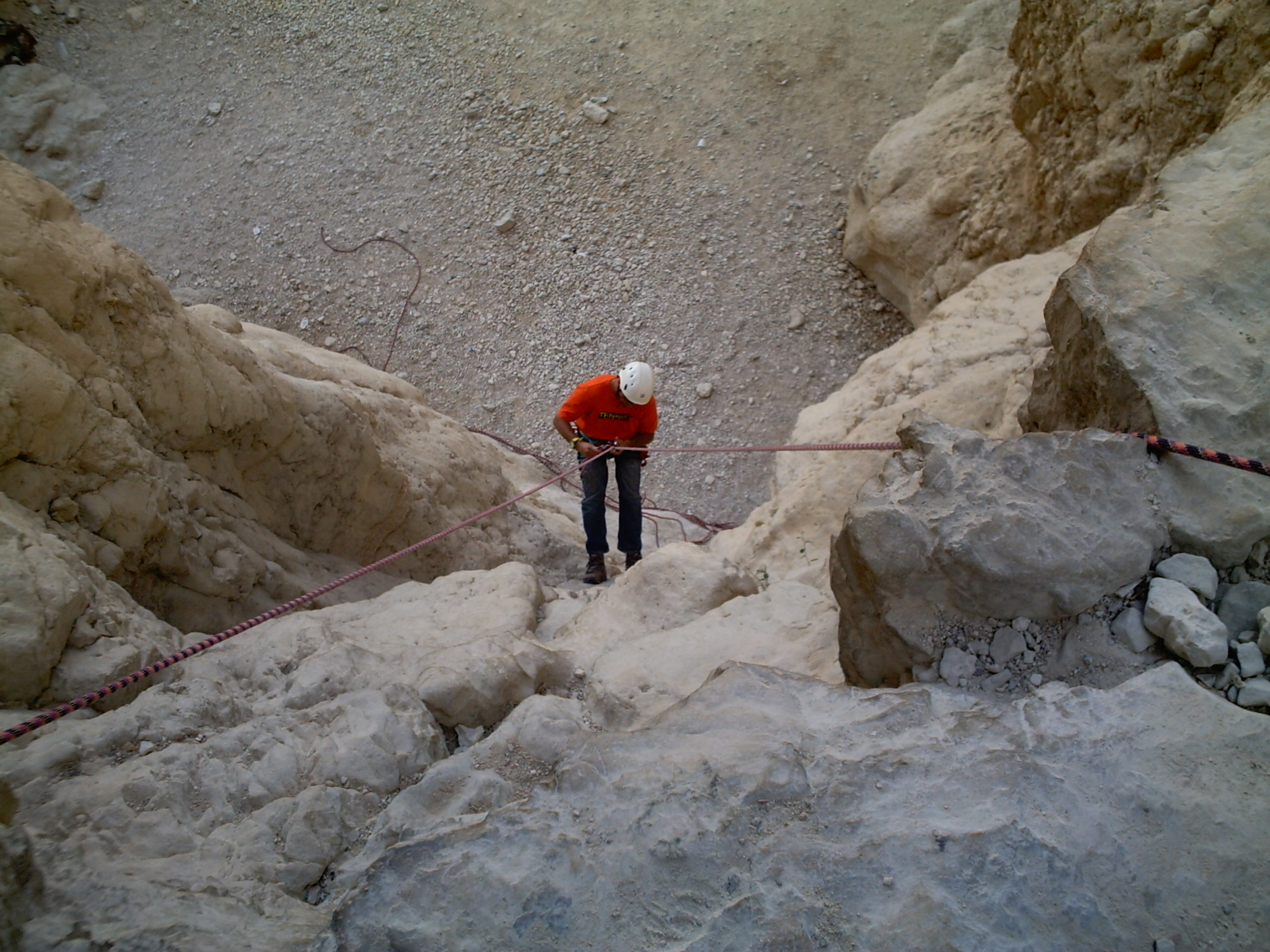 סנפליג בנחל תמר מדבר יהודה